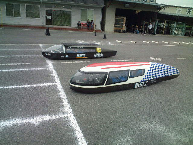 手前がCFRで奥がソーラーカー CFRは鈴鹿の大会で車体35㎏以上クラスで総合2位